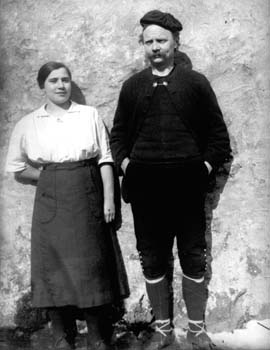 Mikkjál á Ryggi and his wife Bina.